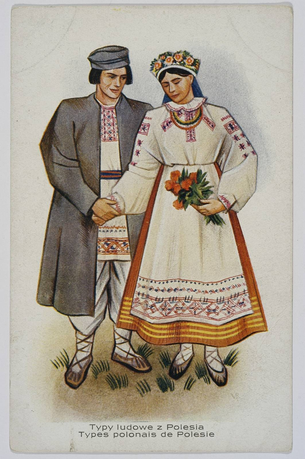 В. Боратынский. Полещуки. 1908